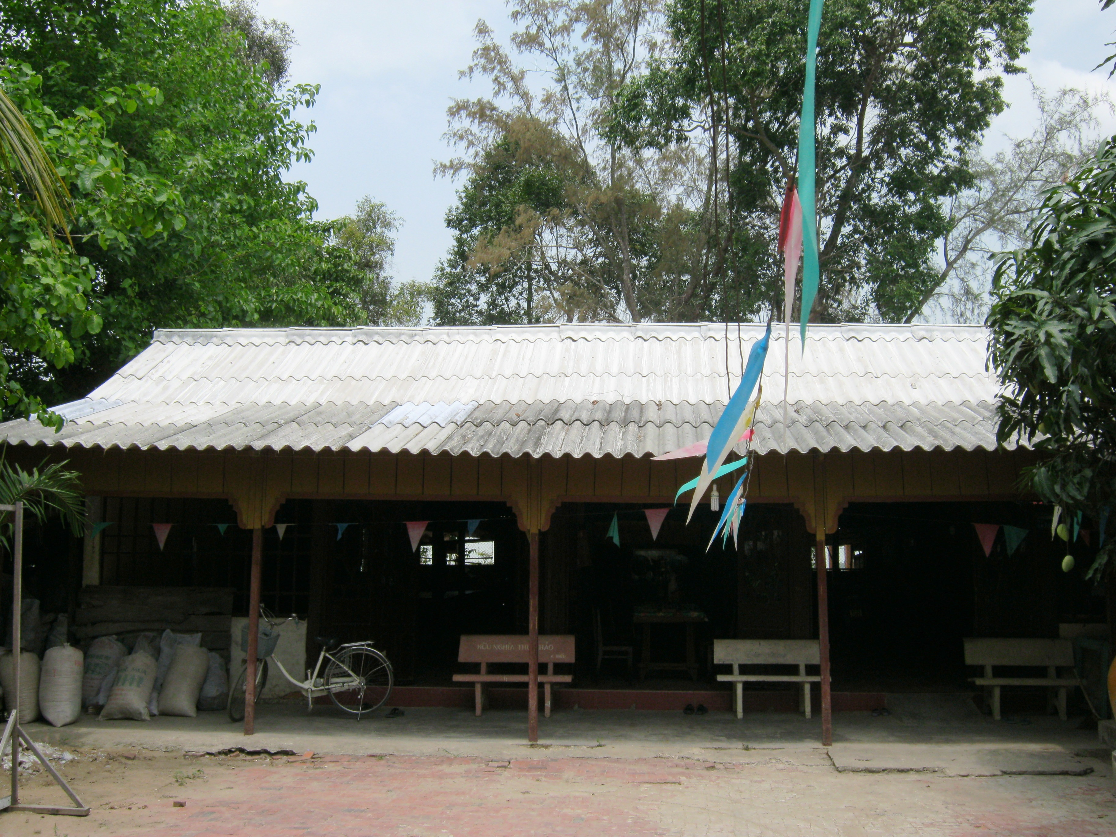 Cốc Ông Tư (còn gọi là Cốc Ông Đạo Cậy) ngày nay. Rất có thể ở vị trí này (thuộc ấp Hưng Trung, xã Đào Hữu Cảnh, huyện Châu Phú, tỉnh An Giang, Việt Nam) khi xưa là chỗ của Hưng Trung doanh, căn cứ chính của Khởi nghĩa Bảy Thưa (1867-1873).